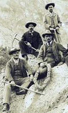 Henri et Alexis Brocherel, assis au premier plan